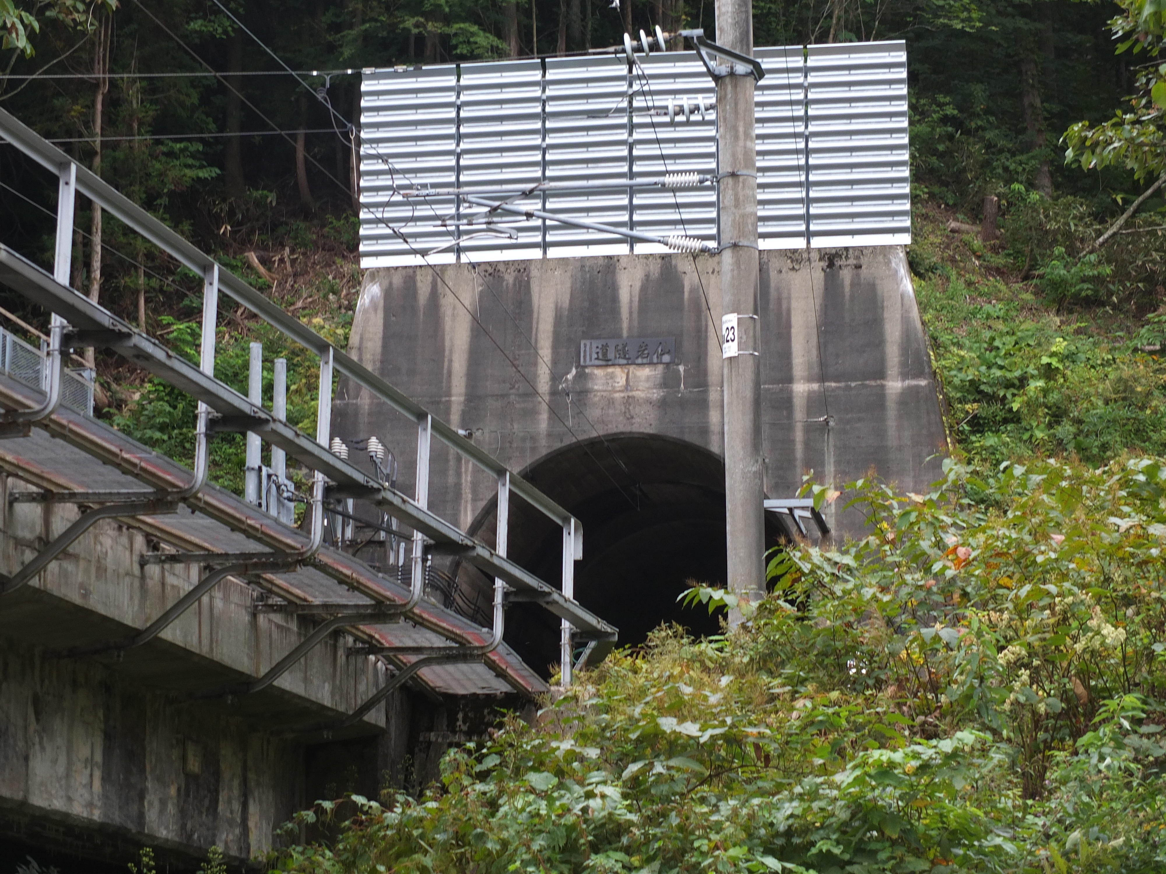 JR東日本田沢湖線の仙岩トンネル、大地沢信号場側坑口